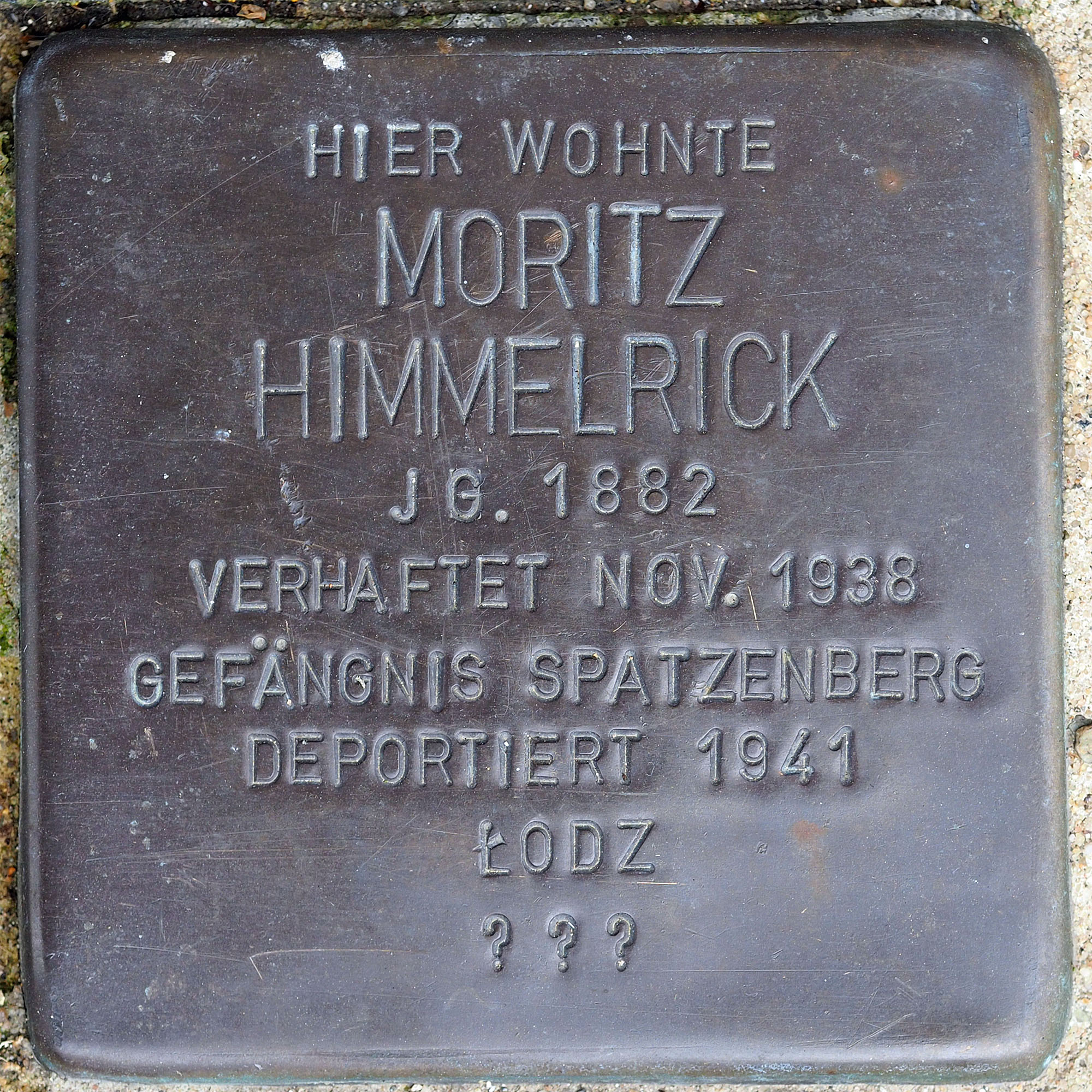 Stolpersteine MG: Himmelrick, Moritz